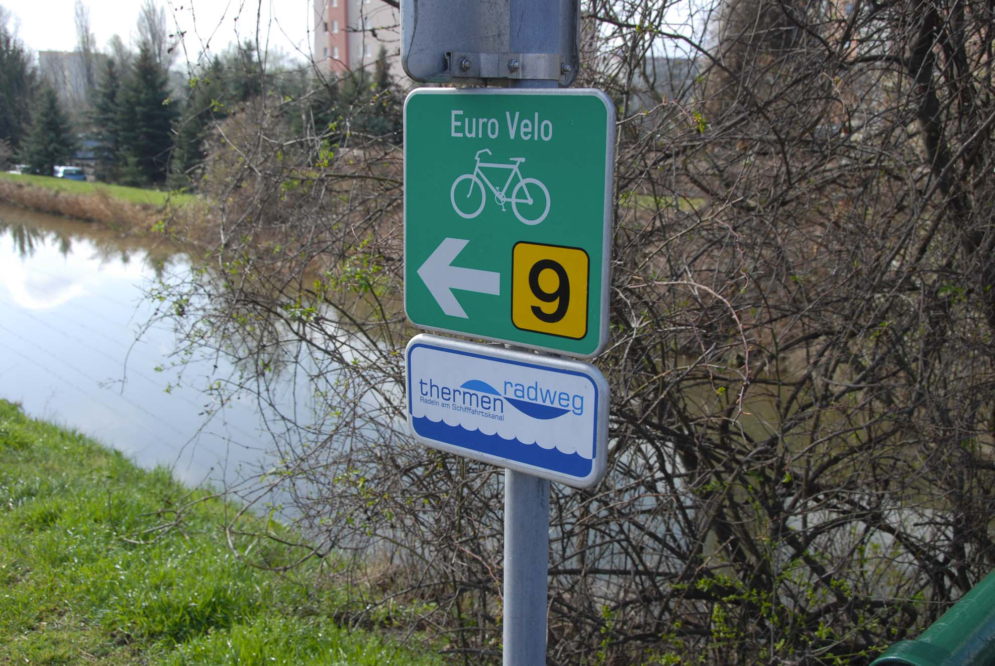 Der Wiener Neustädter Kanal als Revier für Radsportler (Euro-Velo 9 und Thermen Radweg. Autor:Motox, aufgenommen 25.03.07